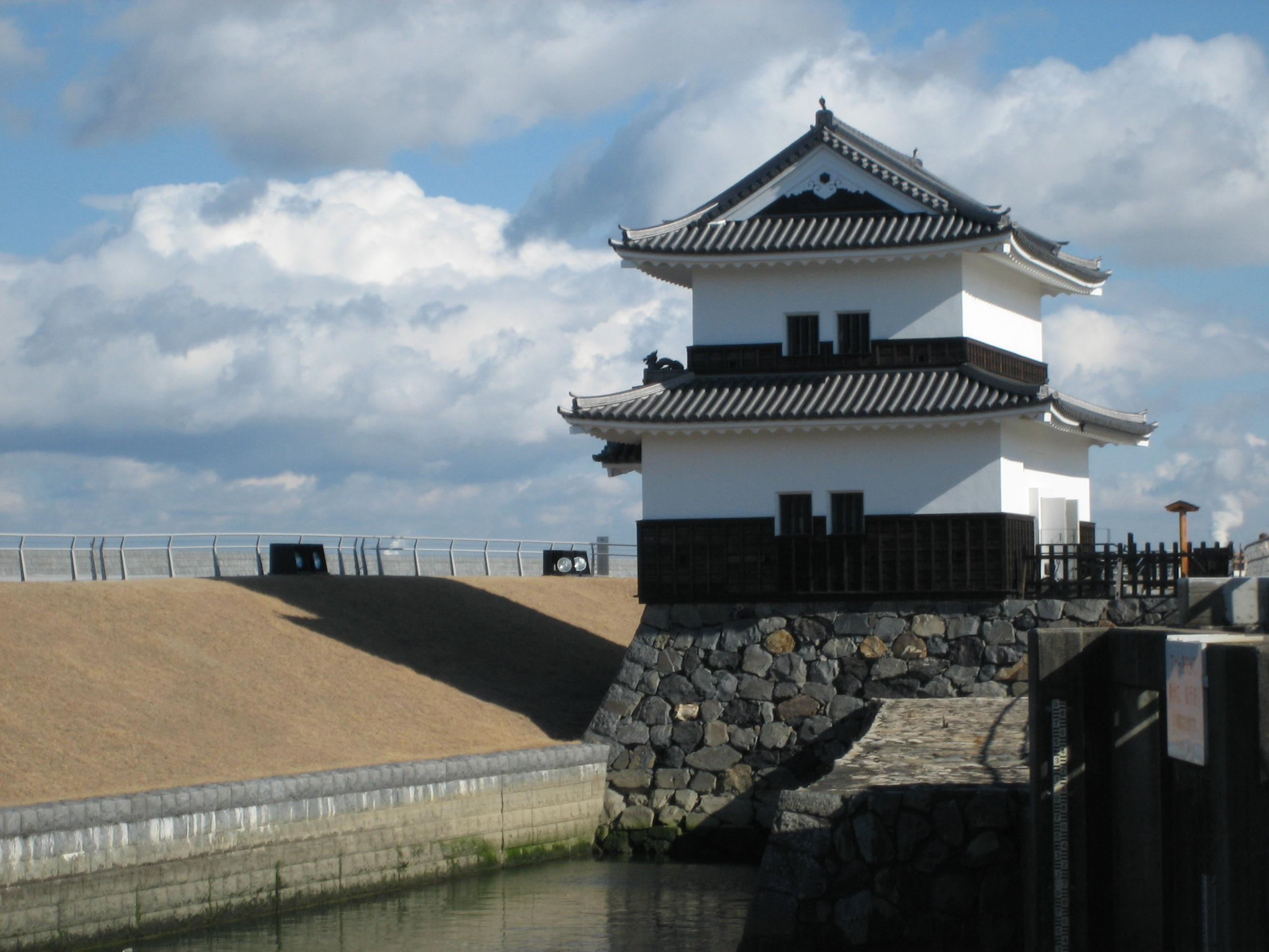 rebuilt Banryu-yagura